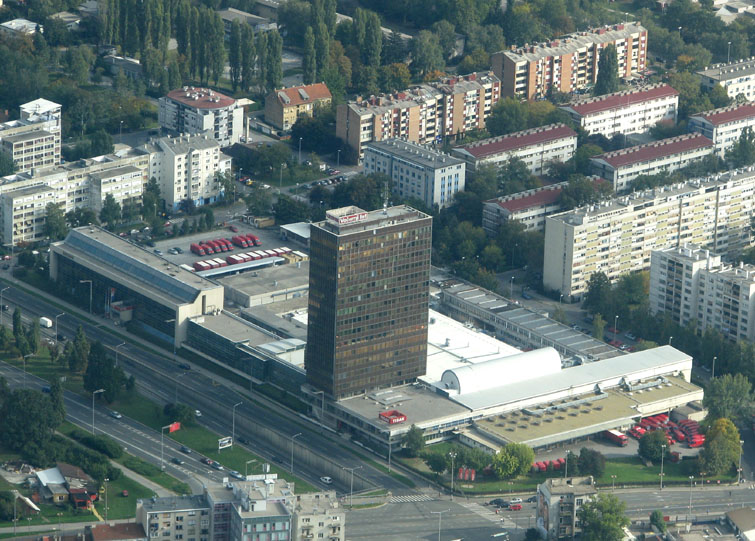 Vjesnikov neboder u Zagrebu